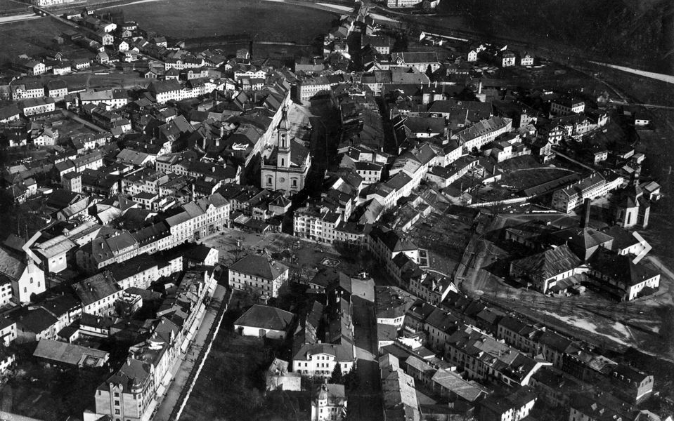 In dem dem Stadtarchiv Traunstein im Jahr 2013 aus Privatbesitz übereigneten zwei Protokollbüchern der Traunsteiner akademischen Studiengenossenschaft fand sich im zweiten Band auf Seite 25 diese frühe Luftbildfotografie, handschriftlich untertitelt “Traunstein aus dem Flugzeug. Aufnahme v. (Graf = gestrichen) Czermak, Ising” Verschiedene Recherchen aufgrund dieser Angaben erbrachten Korrekturen in der Geschichtsschreibung der Stadt Traunstein insofern, dass die ersten Luftbildaufnahmen per Flugzeug nicht aus dem Jahr 1914 stammen, sondern erstmals im Jahr 1920 - trotz der Restriktionen des Versailler Vertrages - vorgenommen wurden. Urheber war der frühere Flugzeugpilolt Führer verschiedener Jagdstaffeln zur Zeit des Ersten Weltkrieges Johann Czermak, der zu Beginn der Weimarer Republik nicht nur die Bestimmungen des Versailler Vertrages unterlief, sondern unter anderem als Waffenhändler beispielsweise auf dem Stammsitz der Czermaks fungierte: Das Schloss Ising zählte Anfang der 1920er Jahren zu den größten geheimen Waffenlagern des vormaligen Königreichs Bayern. Der in den durch den Personenkreis um den späteren SA-Mann Hans Schweighart verübten Fememord an dem Dienstmädchen Maria Sandmayer verwickelte Czermak starb unverheiratet am 10. Februar 1928 im Alter von 31 Jahren ...